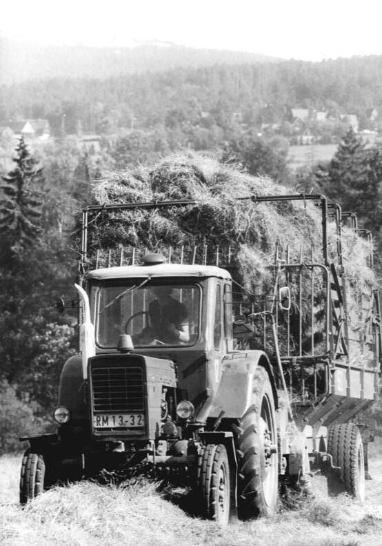 LPG Hennersdorf, Heuernte ADN-ZB Häßler 26.8.83 Bez.Dresden: Heu, wichtige Futterreserve für die Winterzeit, bringen die Genossenschaftsbauern der LPG Hennersdorf im Kreis Dippoldswalde ein.